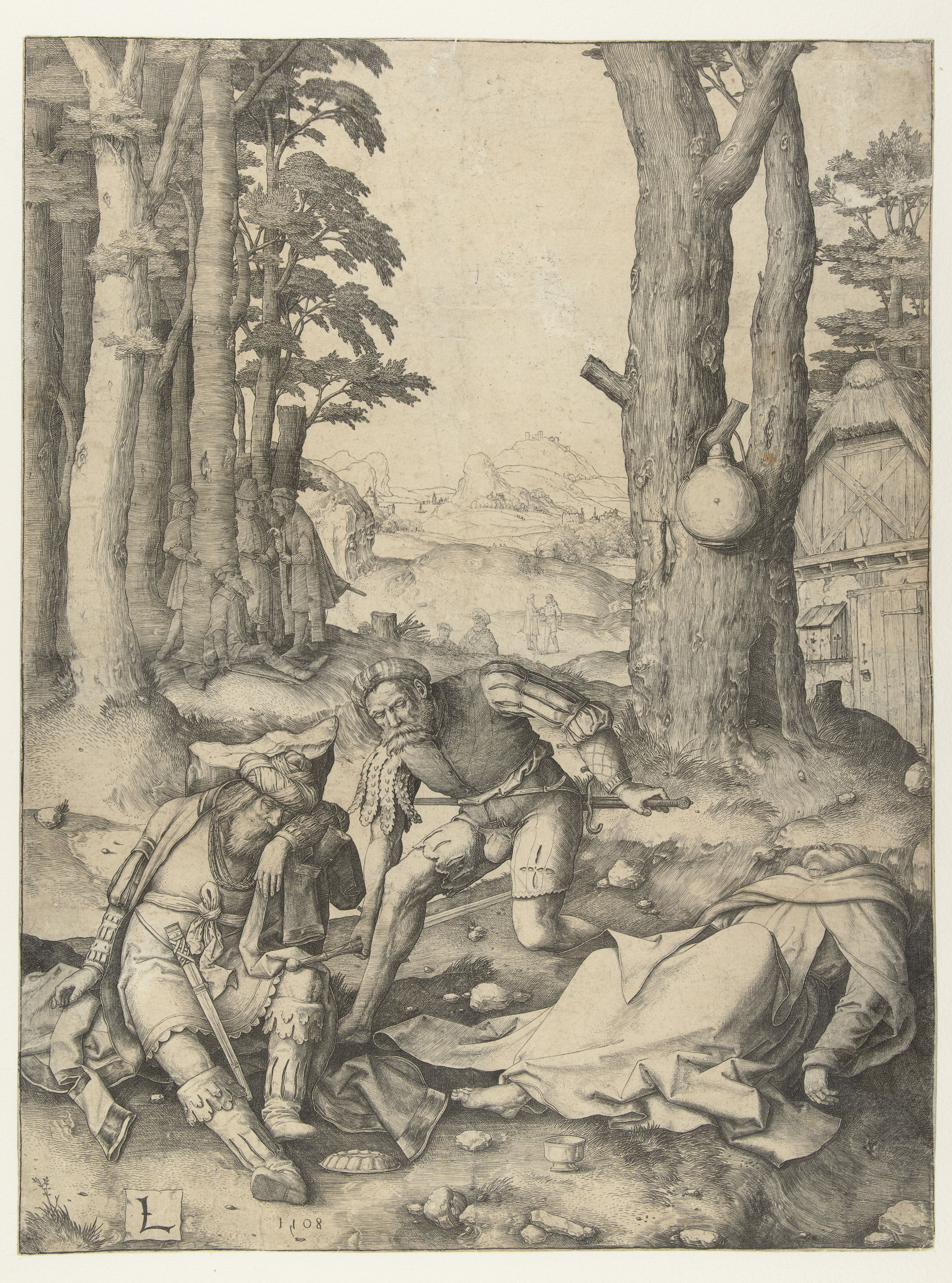 IdentificatieTitel(s): Mohammed en de monnik SergiusObjecttype: prent Objectnummer: RP-P-1939-436Catalogusreferentie: New Hollstein Dutch 126-1(3)(c)Bartsch 126Opschriften / Merken: verzamelaarsmerk, verso rechts, gestempeld: Lugt 2228Omschrijving: Monnik Sergius ligt met keel doorgesneden op grond, Mohammed slapend tegen een boomstronk. Dienaar van Mohammed legt het zWaar: d waarmee hij Sergius heeft vermoord op de schoot van Mohammed.VervaardigingVervaardiger: prentmaker: Lucas van Leyden (vermeld op object)naar eigen ontwerp van: Lucas van LeydenPlaats vervaardiging: NederlandenDatering: 1508Fysieke kenmerken: gravureMateriaal: papier Techniek: graveren (drukprocedé)Afmetingen: blad: h 289 mm × b 218 mmOnderwerpWat: monk(s), friar(s)seer, prophet ~ Islam, Mohammedanism: MohammedWie: Mohammed [profeet]Verwerving en rechtenCredit line: Aankoop uit het F.G. Waller-FondsVerwerving: aankoop 25-apr-1939Copyright: Publiek domein